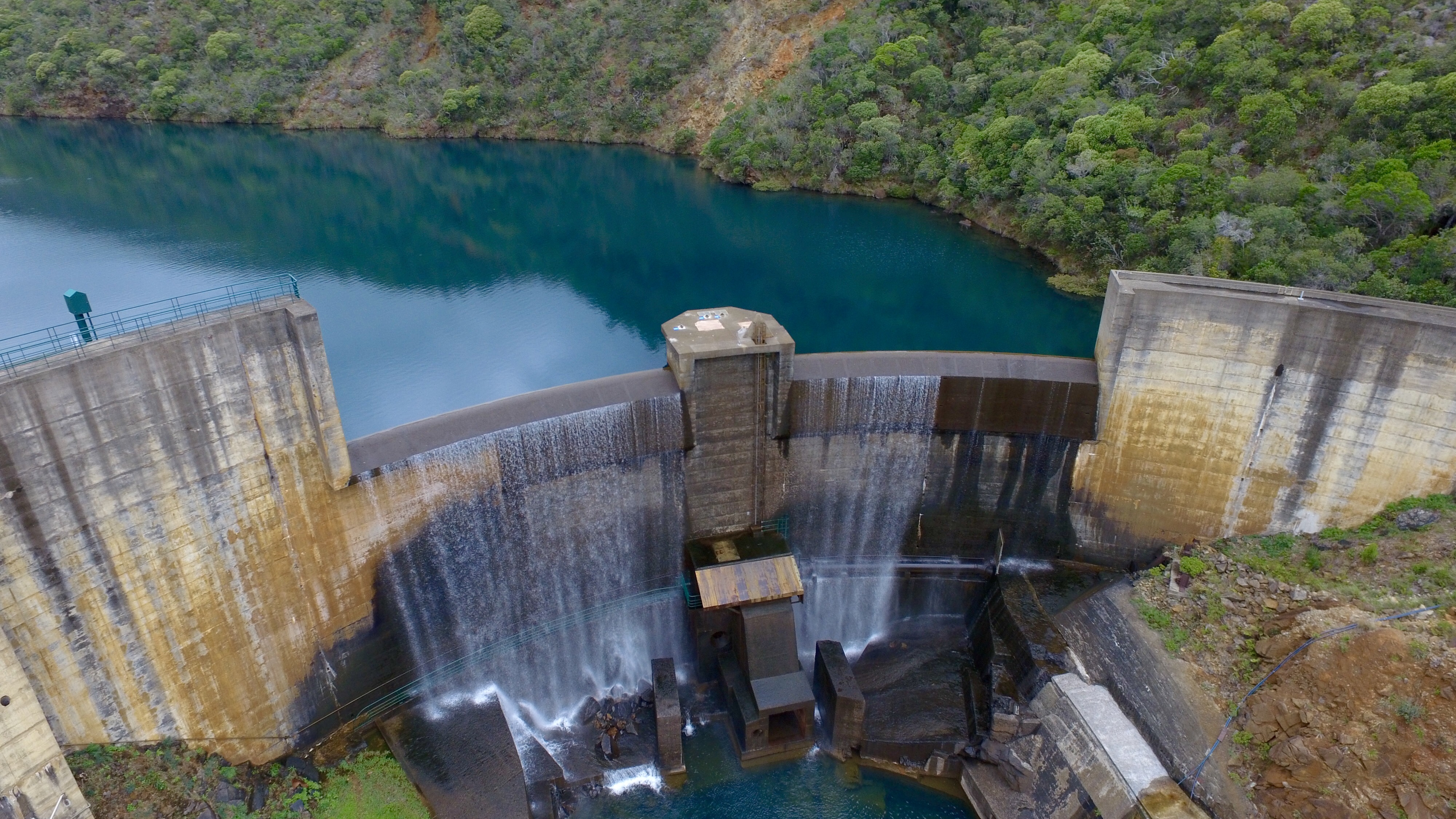 Barrage de la dumbea